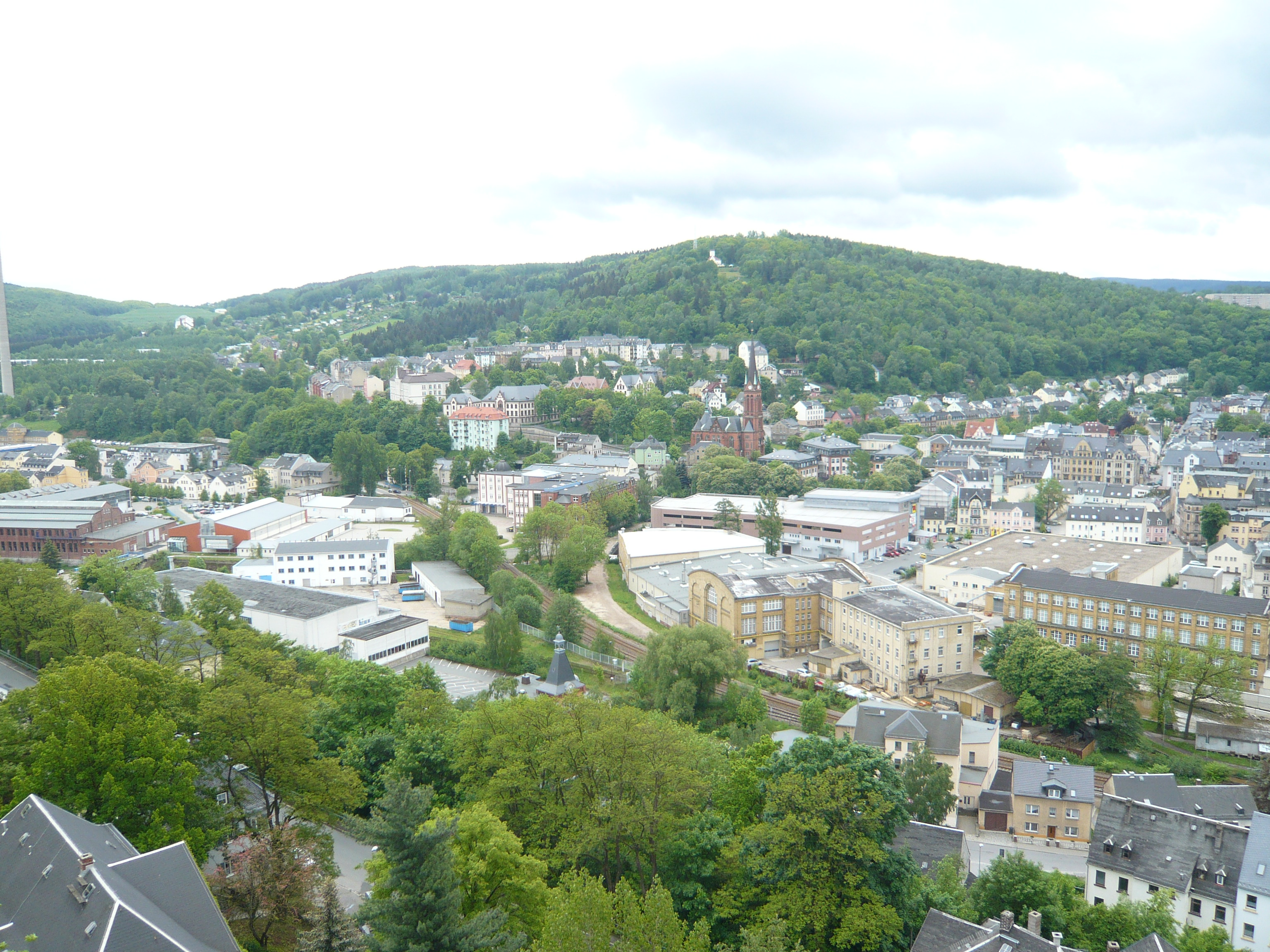 Stadt Aue, Umgebender Berg